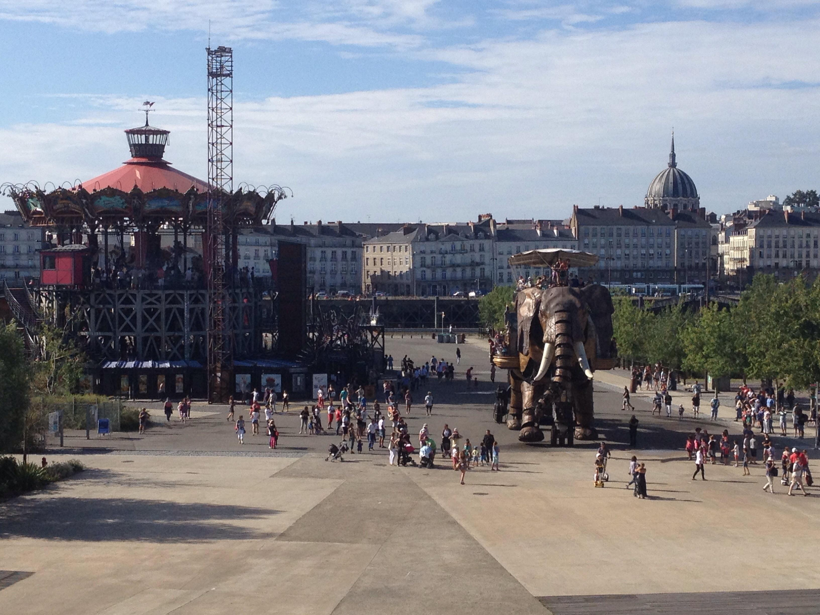 Machine de l'Ile